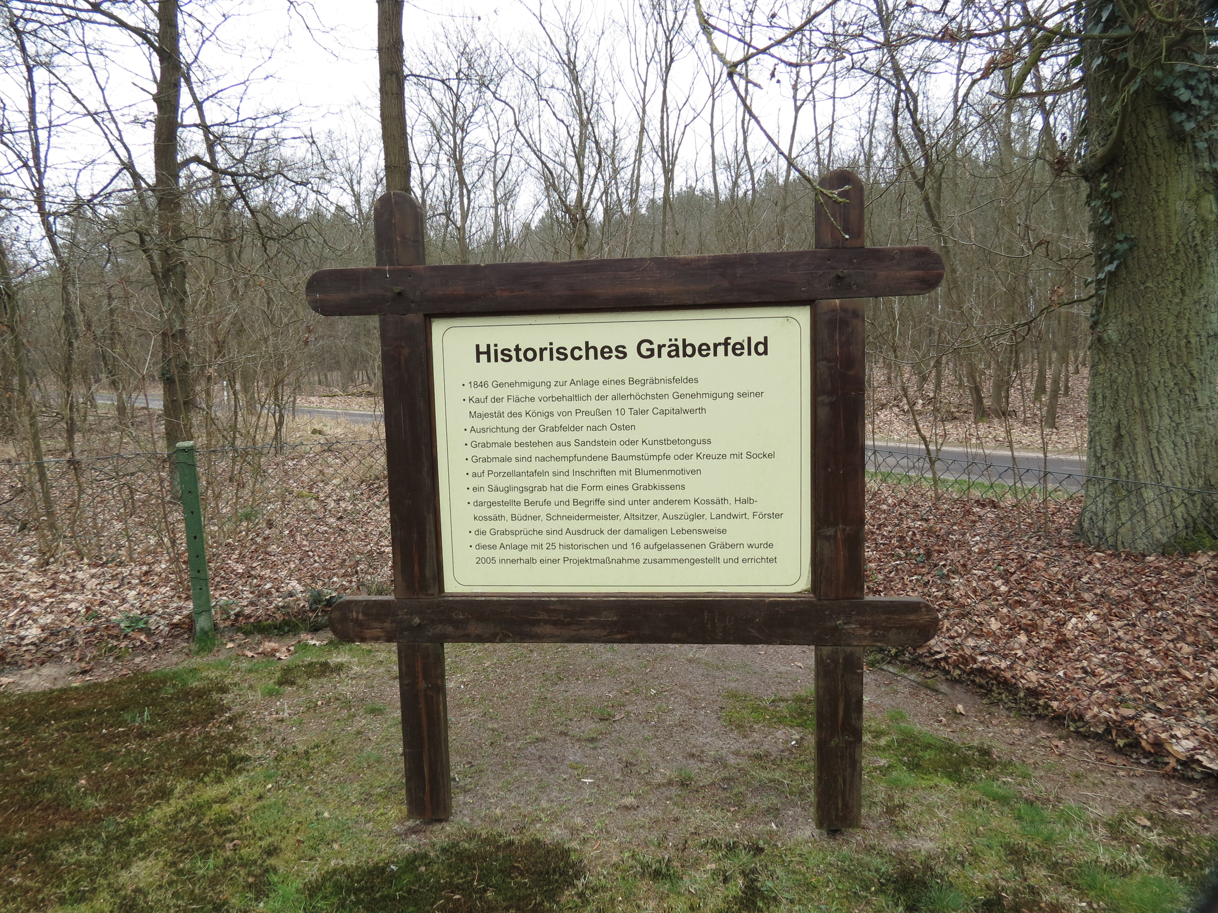 Waldfriedhof, Historisches Gräberfeld, Plattkow, Ortsteil der Gemeinde Märkische Heide, Landkreis Dahme-Spreewald, Brandenburg, Deutschland